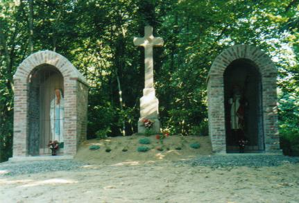 Saint-Didier (Ille-et-Vilaine): ancien ermitage de saint Golven, état actuel